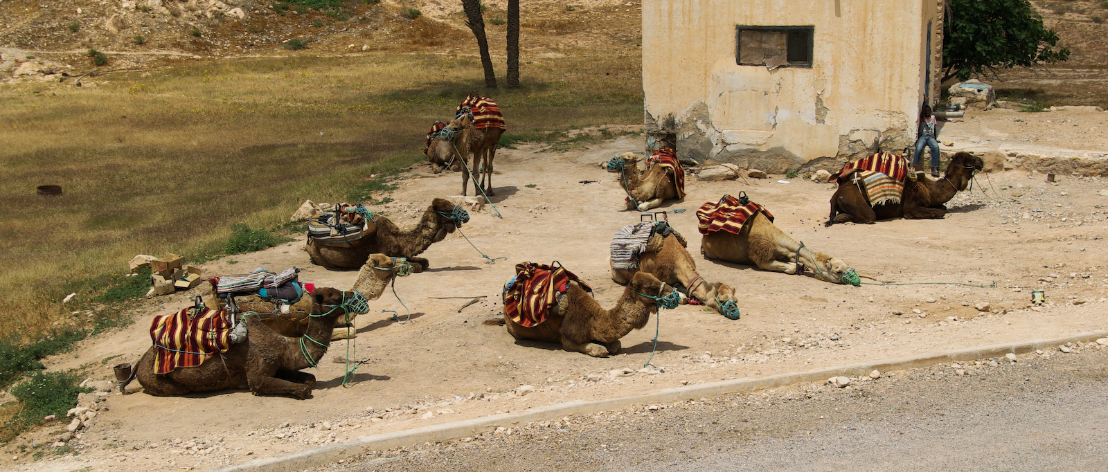 Parking